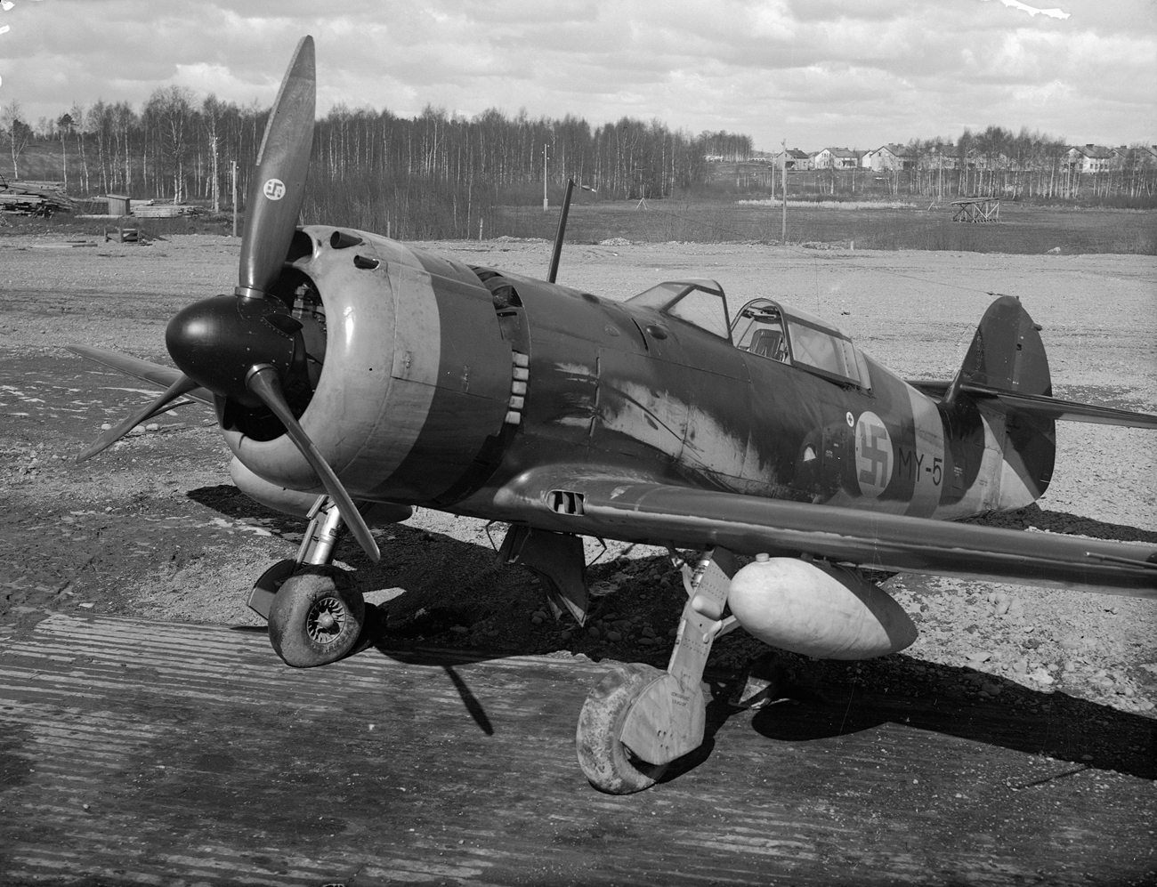 Valtion Lentokonetehtaan valmistama VL Myrsky II MY-5 vuonna 1944.